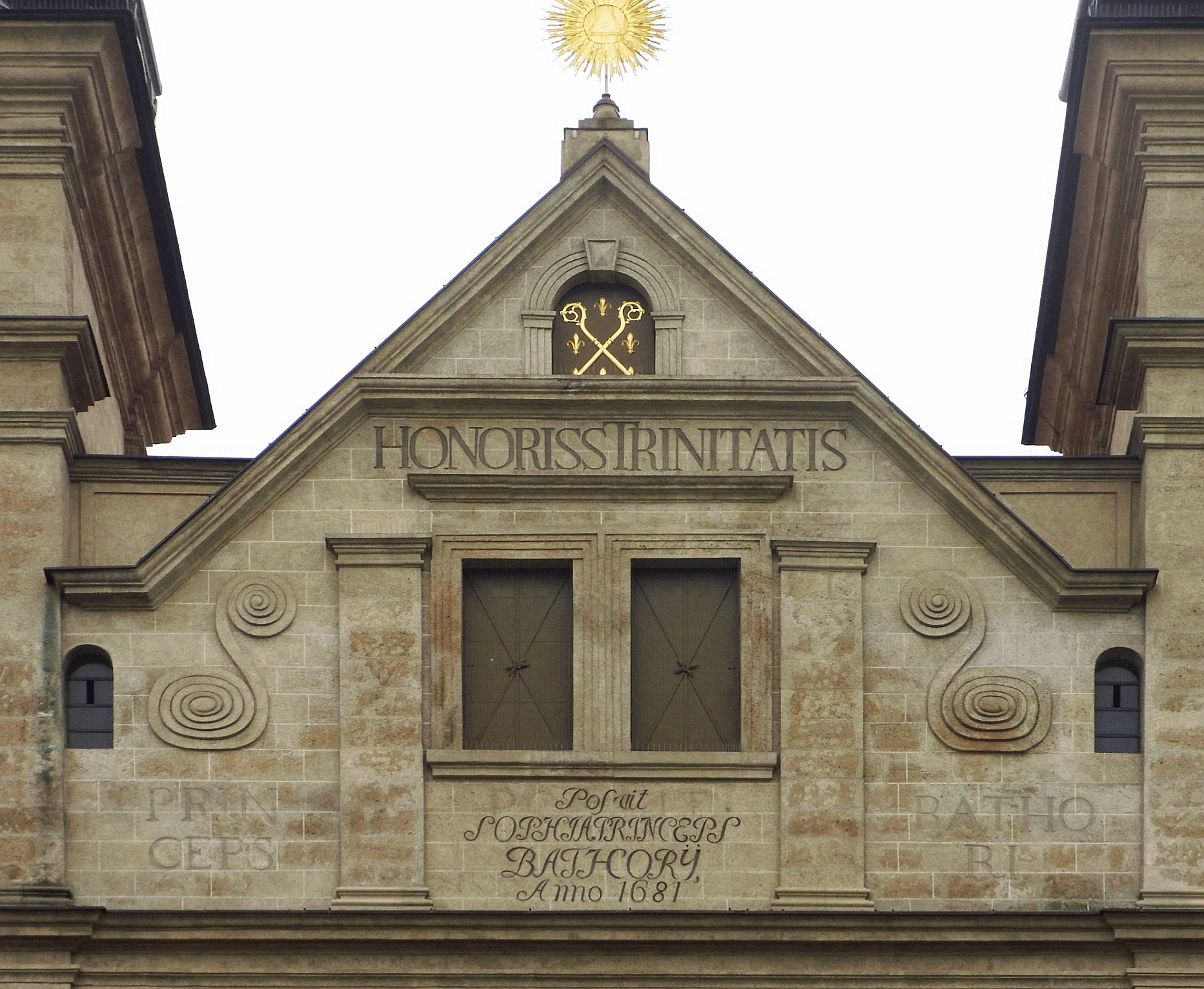 Kerk van de Heilige Drievuldigheid (Košice) (Slowakije) - Gevel (detail)